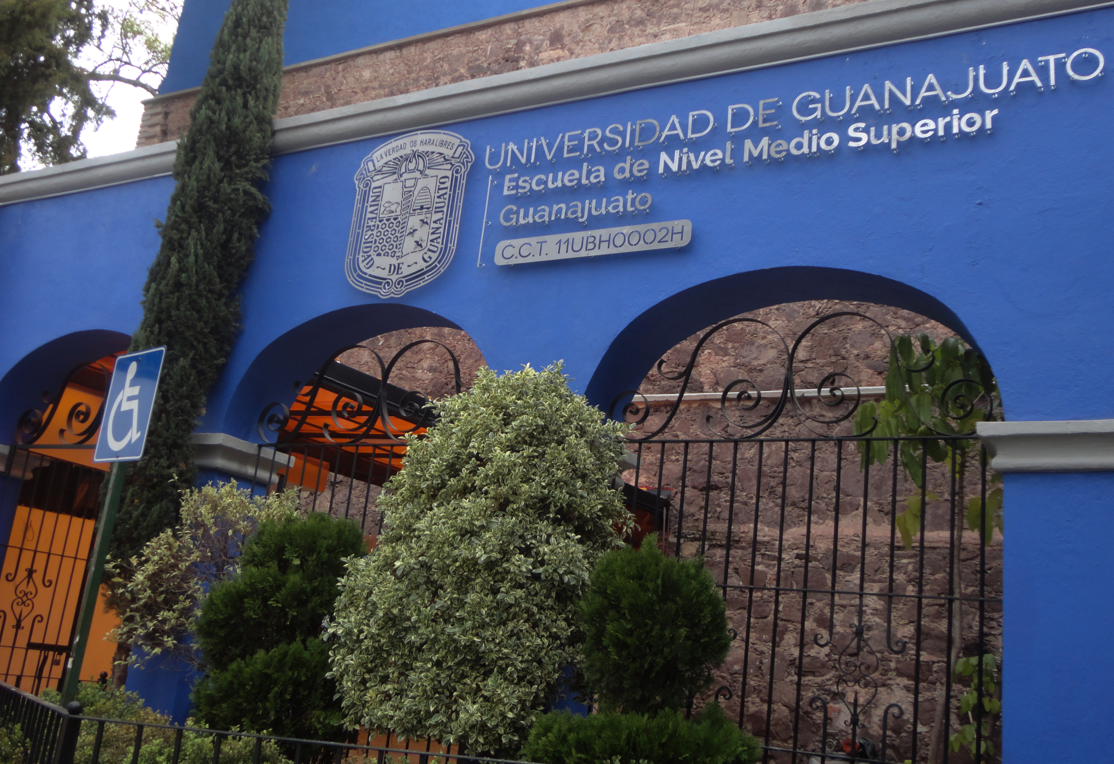 Escuela del Nivel Medio Superior de Guanajuato (Prepa Oficial), UG - Guanajuato Capital, GTO, México.